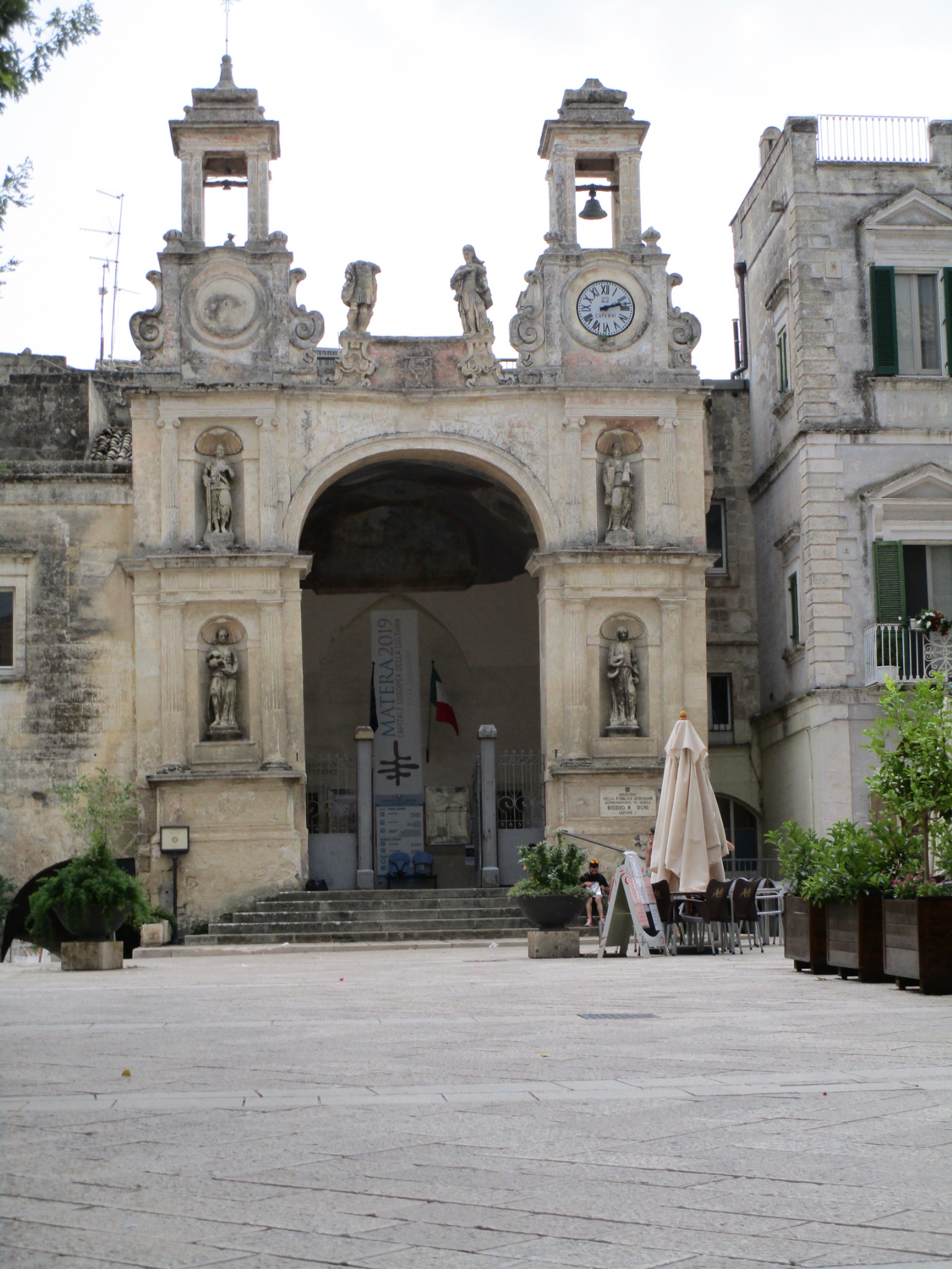 Palazzo del Sedile This is a photo of a monument which is part of cultural heritage of Italy.